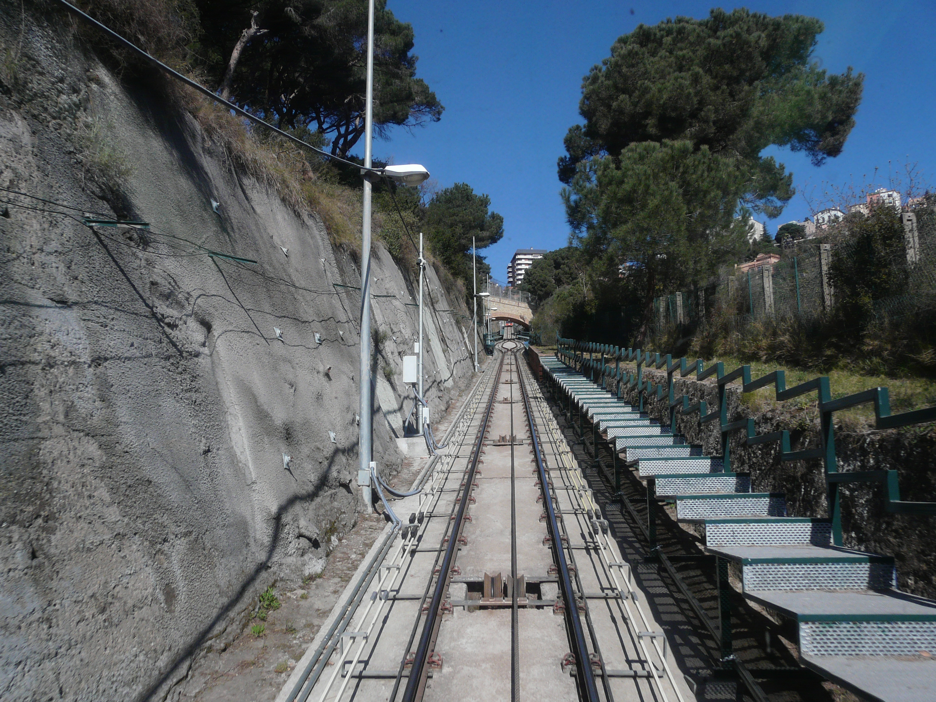 Conjunt del Funicular de Vallvidrera (Barcelona) Object location41° 24′ 51.1″ N, 2° 06′ 20.31″ E